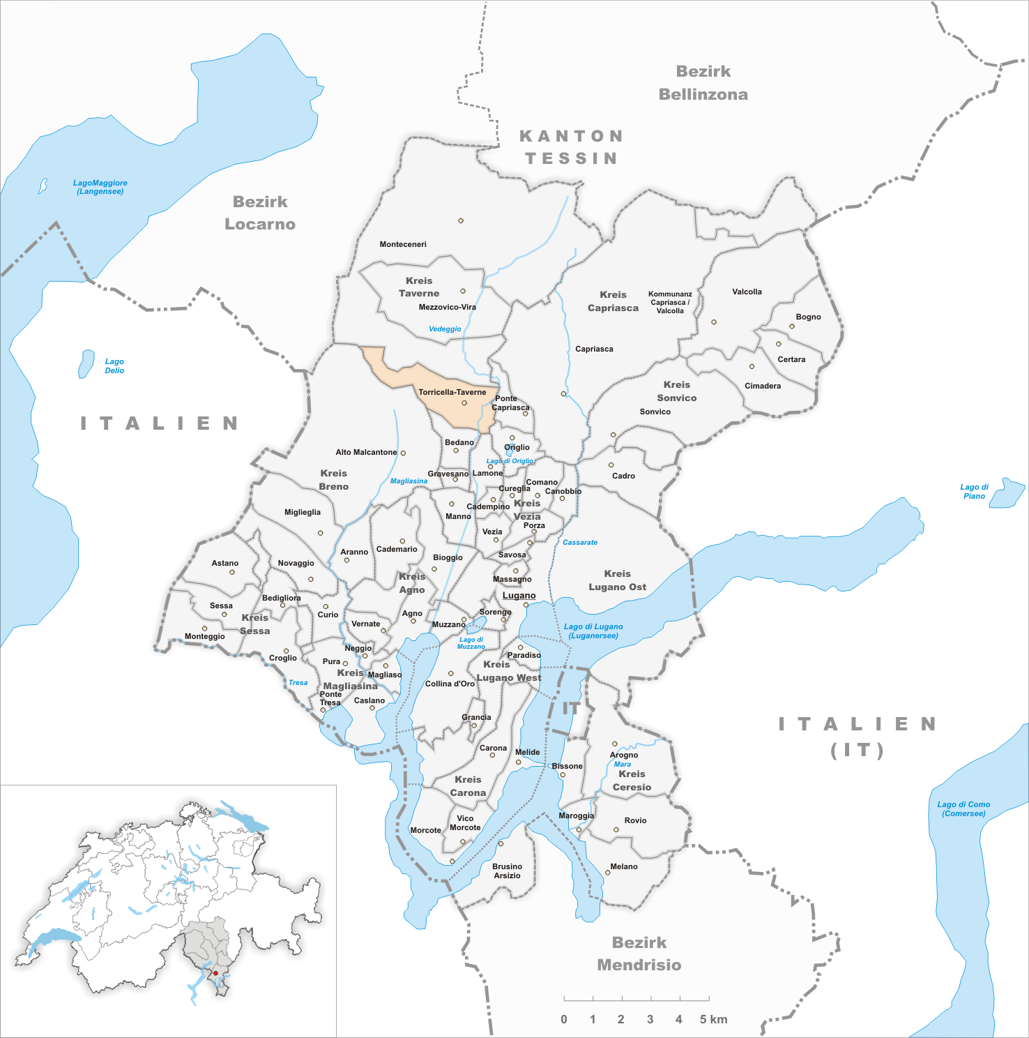 Municipality Torricella-Taverne